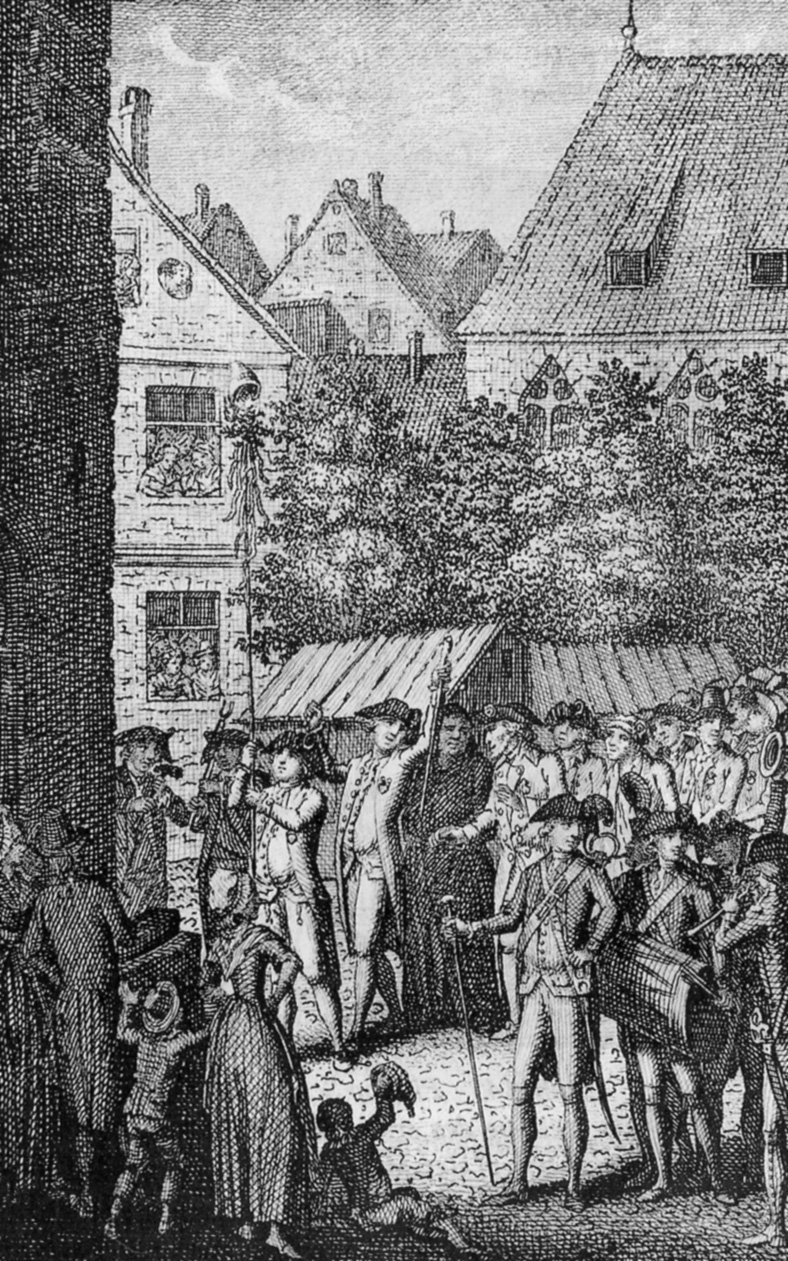 Zug zur Errichtung des ersten Mainzer Freiheitsbaums am 3. November 1792